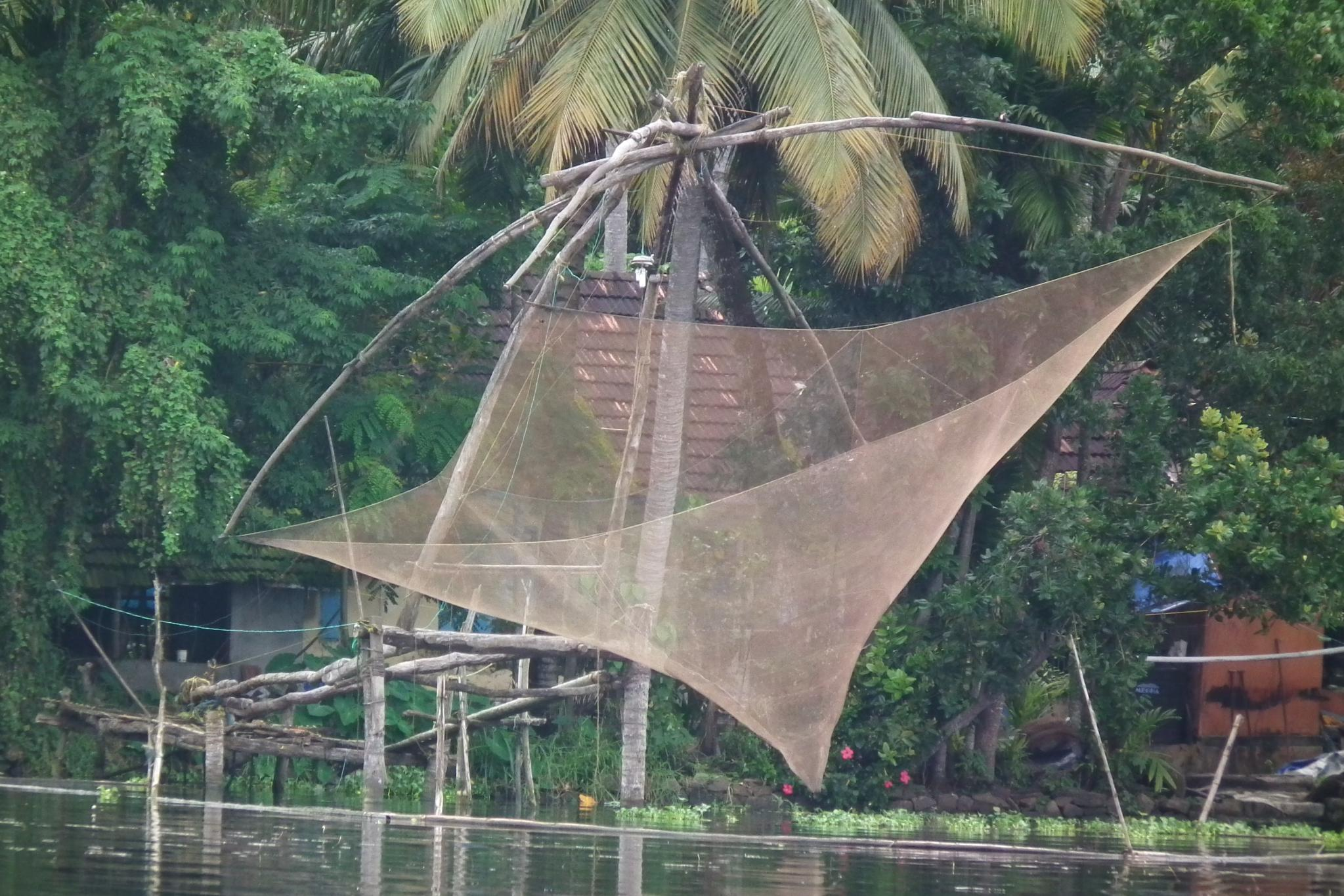 A small Cheenavala in Vembanattu kayal Kerala